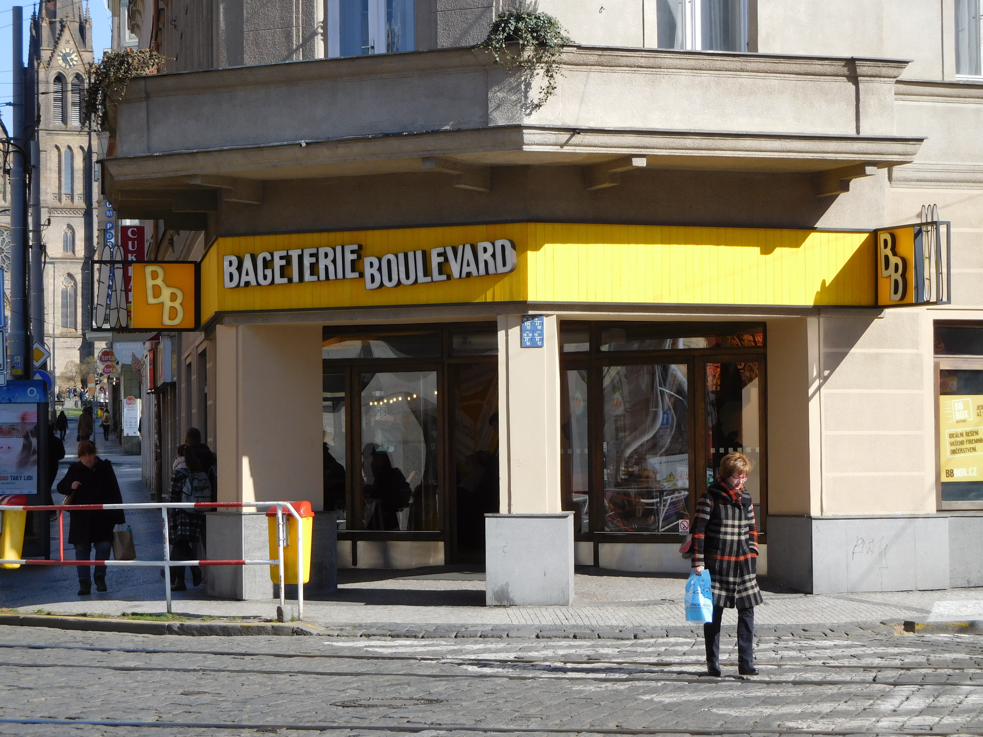 Praha - Vinohrady, Jugoslávská 10, Bageterie Boulevard